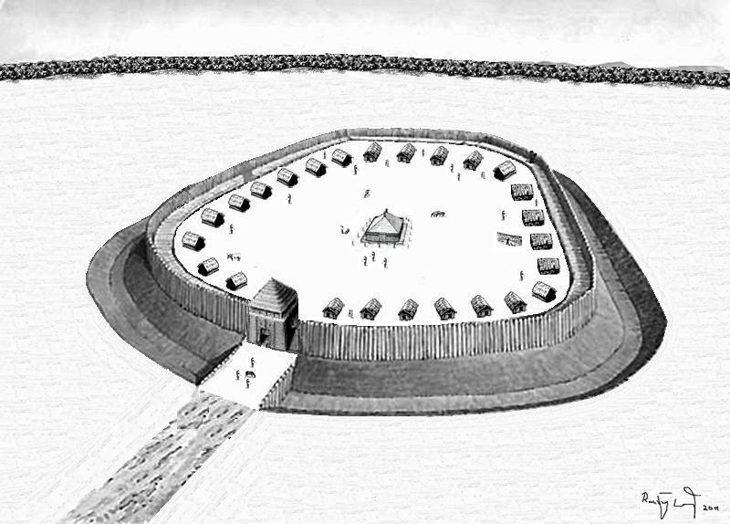 Einfacher Rekonstruktionsversuch der slawischen Burg Mecklenburg